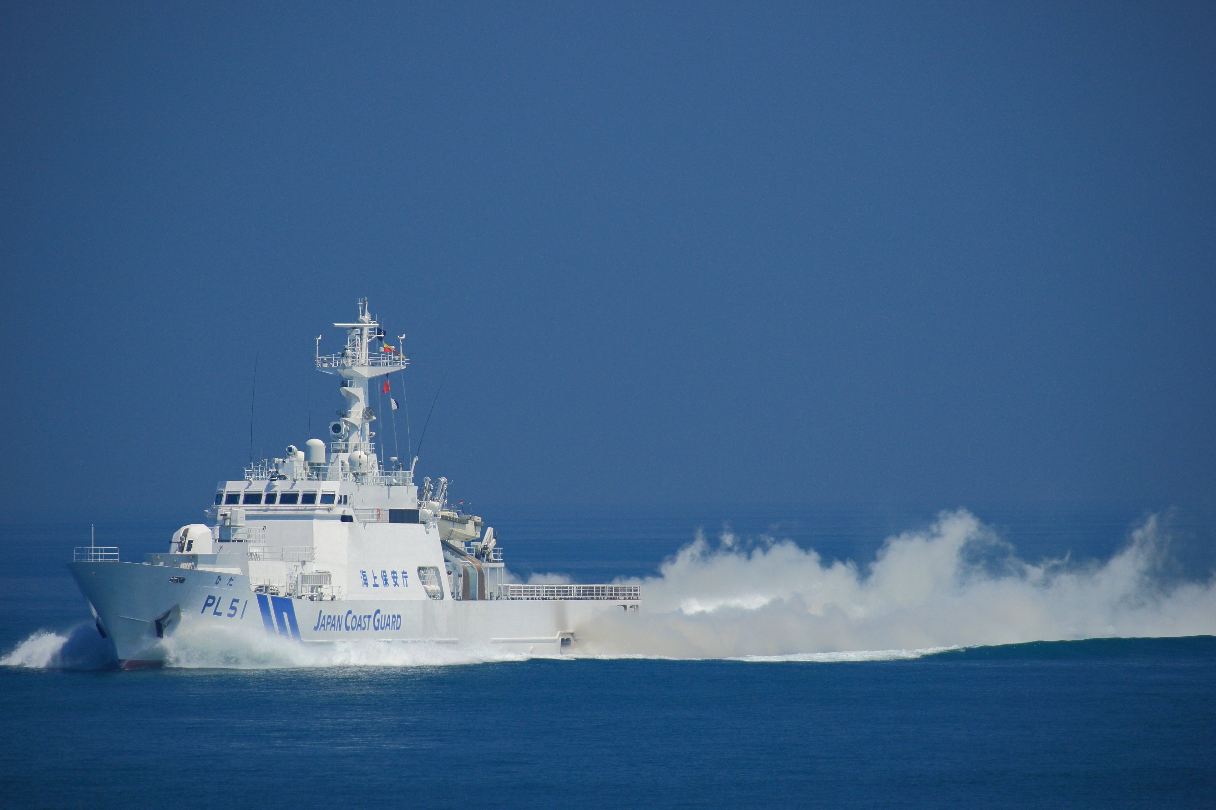 新潟沖で撮影された、海上保安庁第九管区海上保安本部のPL51ひだ